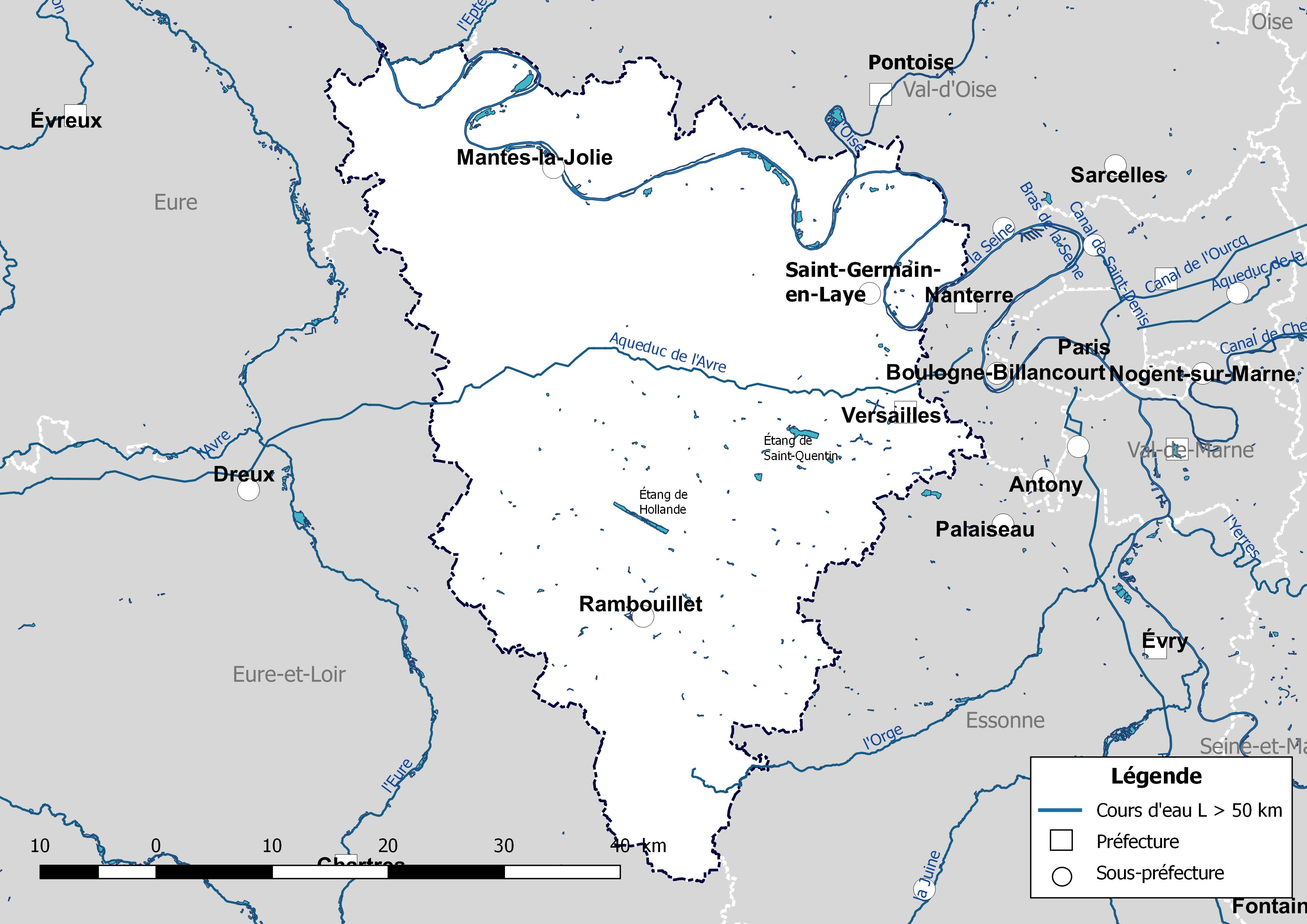 Carte des cours d'eau de longueur supérieure à 50 km drainant le département des Yvelines (France).